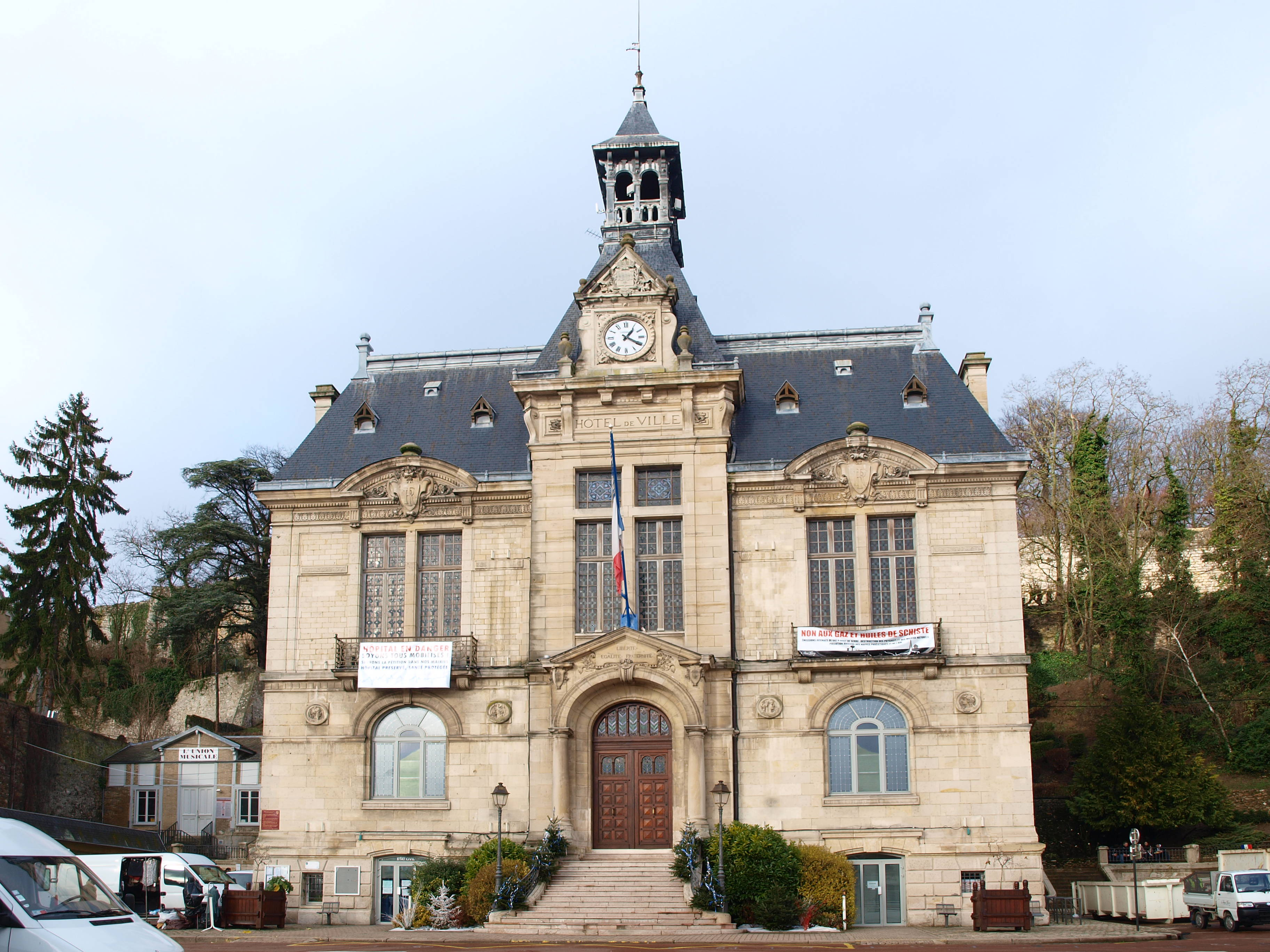 Château-Thierry (Aisne, France) ; la mairie.